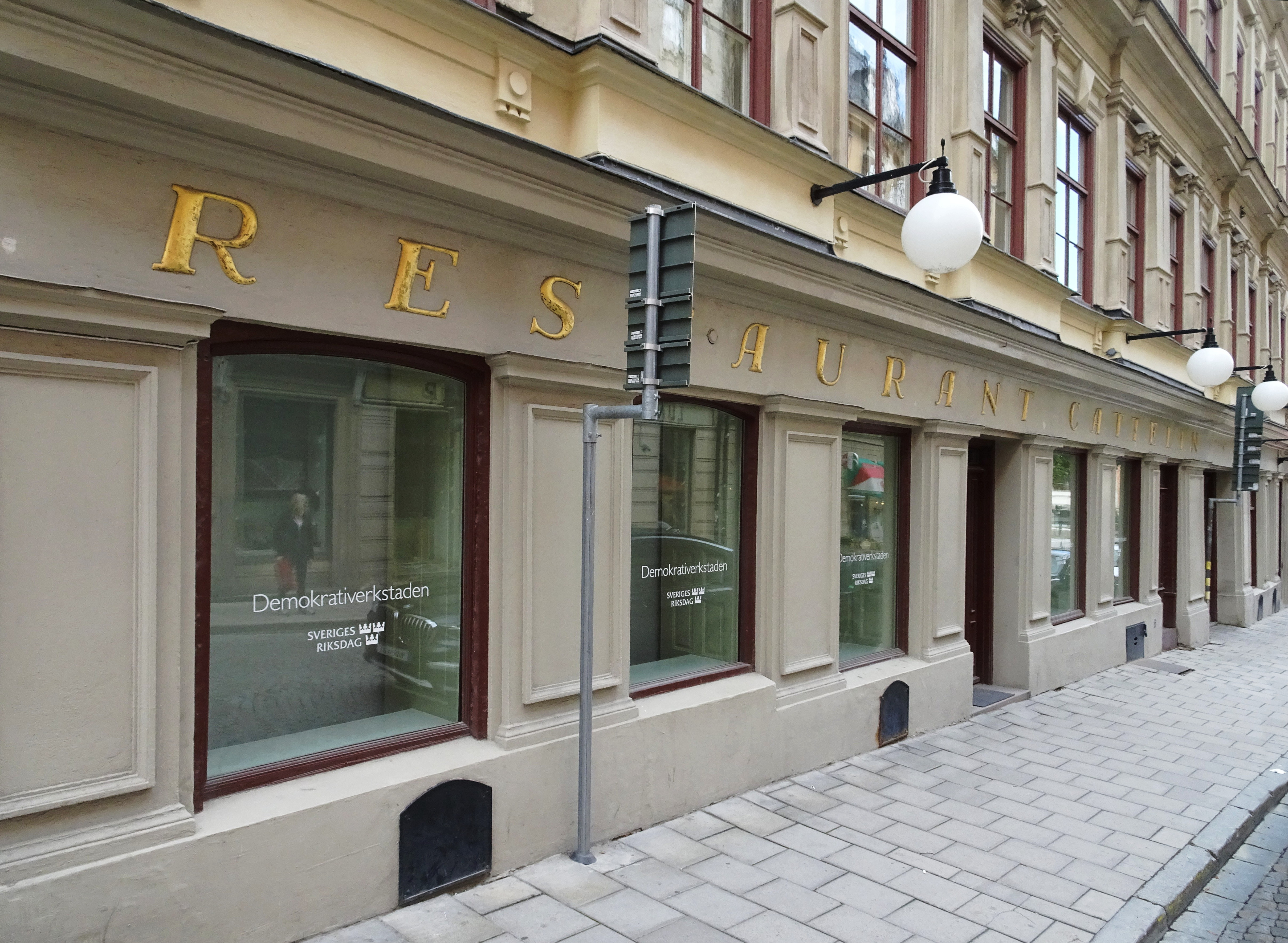 Före detta Restaurant Cattelin i Gamla stan